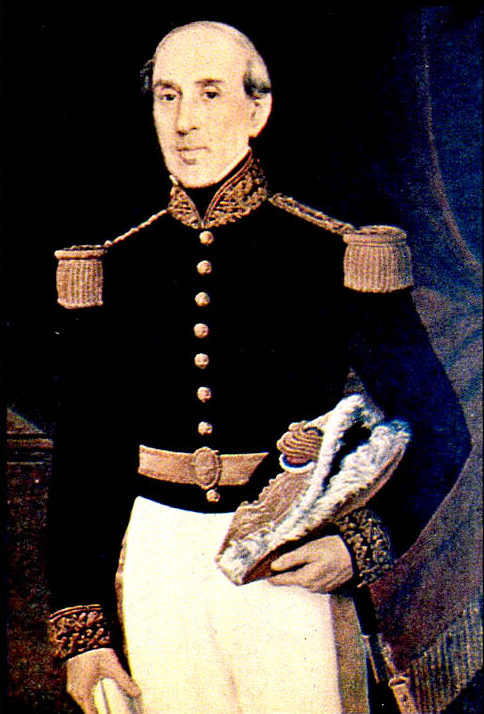 Manuel Blanco Encalada (Buenos Aires, 21 de abril de 1790 — Santiago, 5 de septiembre de 1876), fue un militar chileno[1] de origen argentino[2] que participó en las guerras de Independencia de Chile, del Perú y contra la Confederación Perú-Boliviana. En el período de Patria Vieja fue capitán del ejército patriota bajo las órdenes de Carrera y en la Patria Nueva se incorporó como oficial en el "Ejército Unido Libertador de Chile".